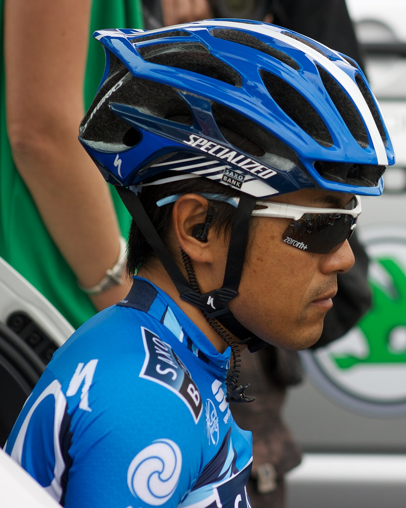 Le coureur cycliste Takashi Miyazawa lors du Tour Down Under 2012.